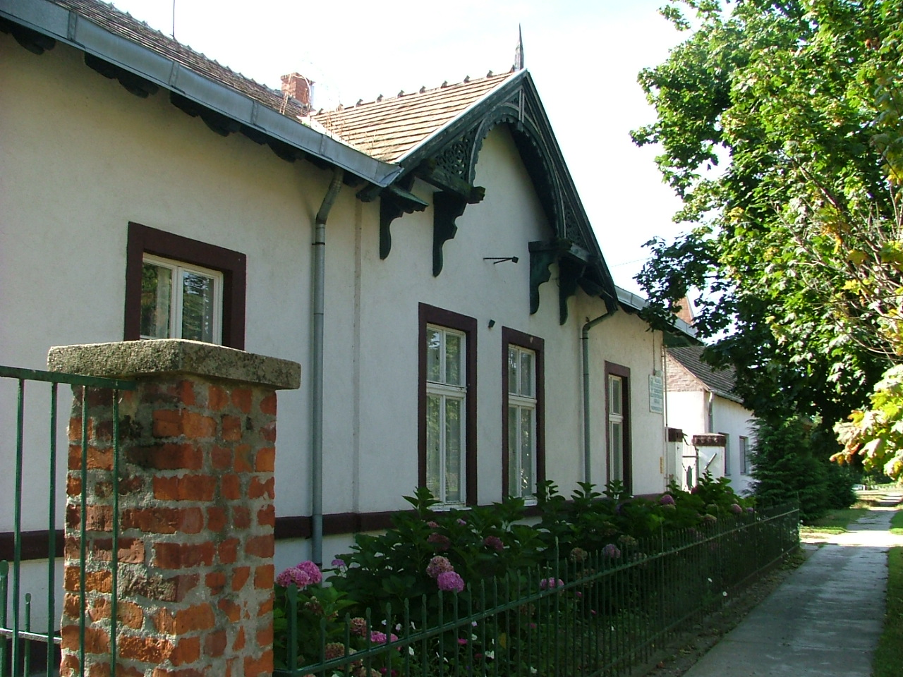 Magyarkeresztúr, az ország első szarvasmarha-megtermékenyítő állomása, a Mesterséges Termékenyítő Főállomás épülete (1948)